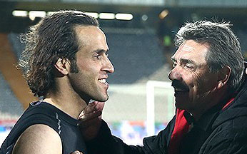 علی کریمی و تونی اولیویرا سرمربی تراکتورسازی تبریز- هفته پایانی لیگ برتر- استقلال ۱ - تراکتورسازی ۳